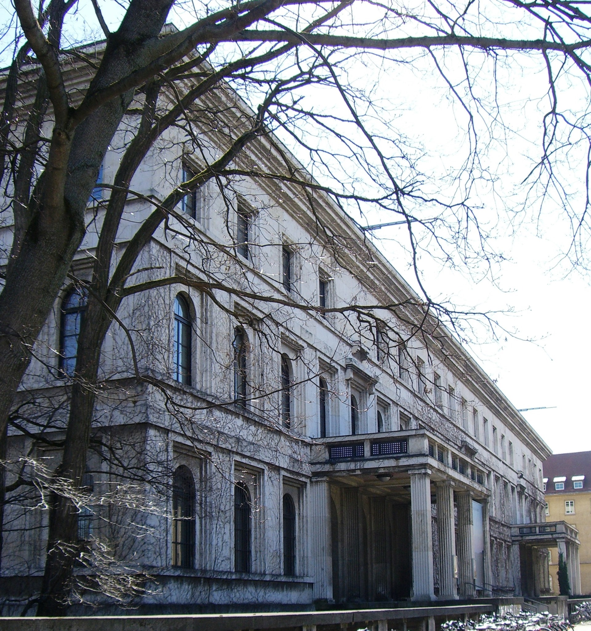 Museum für Abgüsse klassischer Bildwerke (Gebäudefassade)